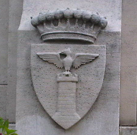 Blason de la Maurienne : d'or à l'aigle éployée de sable, languée et onglée de gueules, à la tour de gueules en pointe.